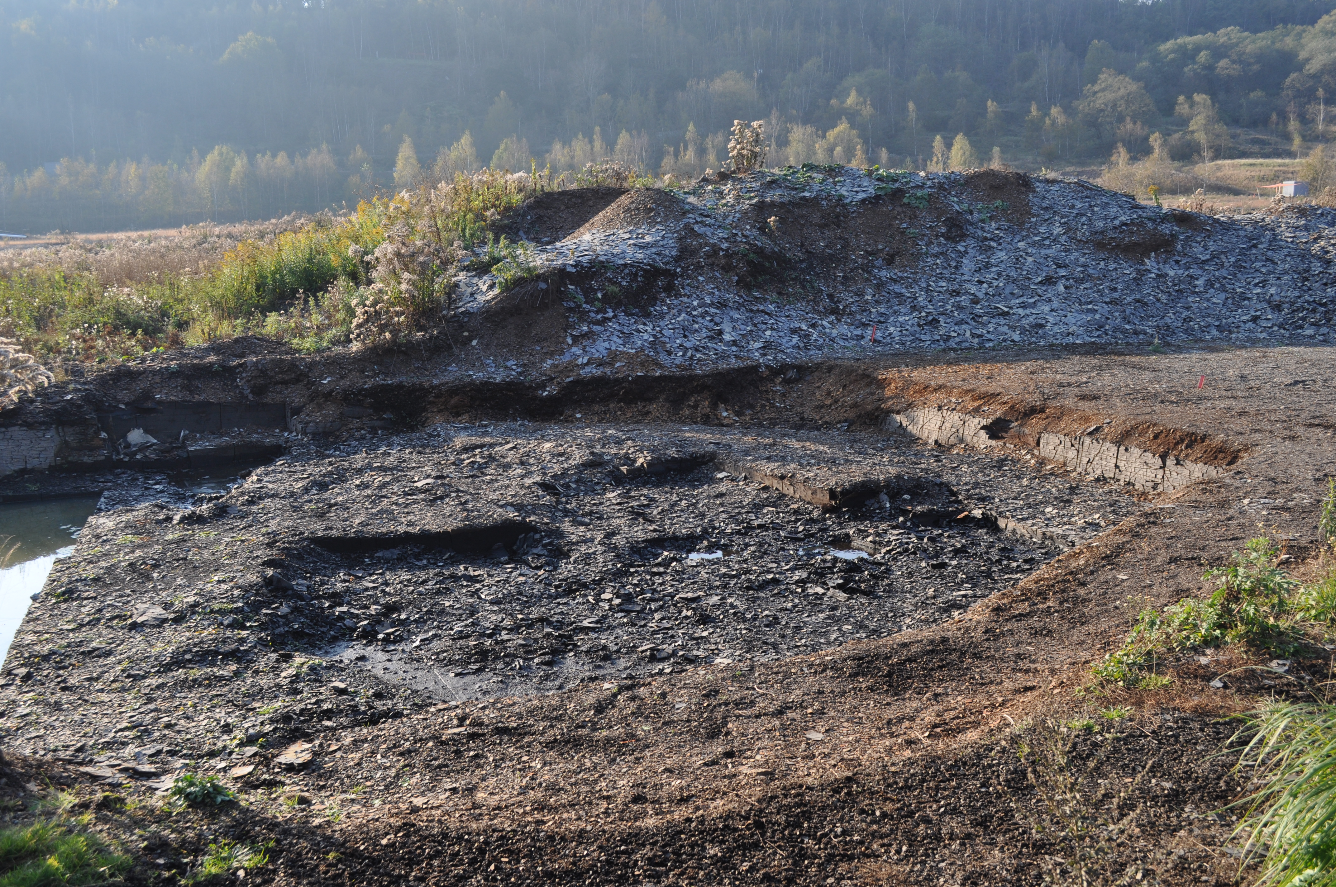 Sitio de excavaciones del equipo de investigación Senckenberg.